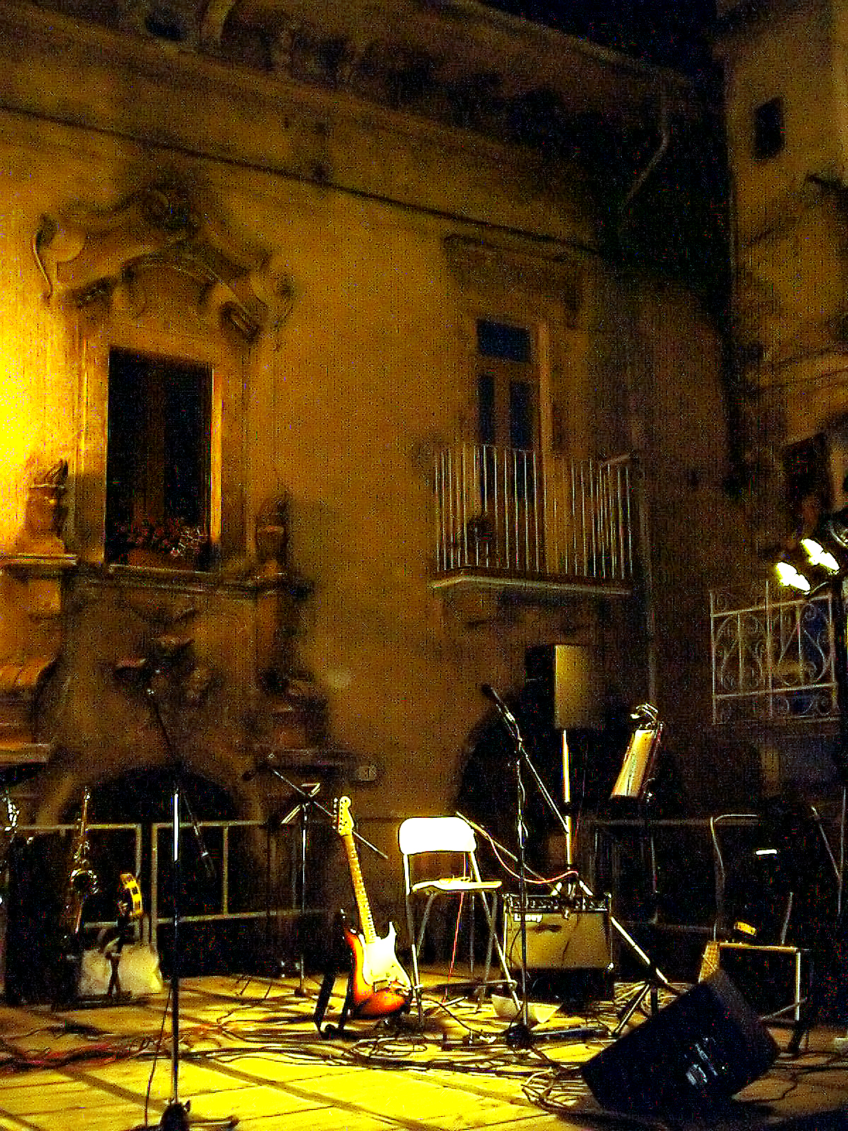 Palazzo Serafini (Scanno, provincia dell'Aquila])